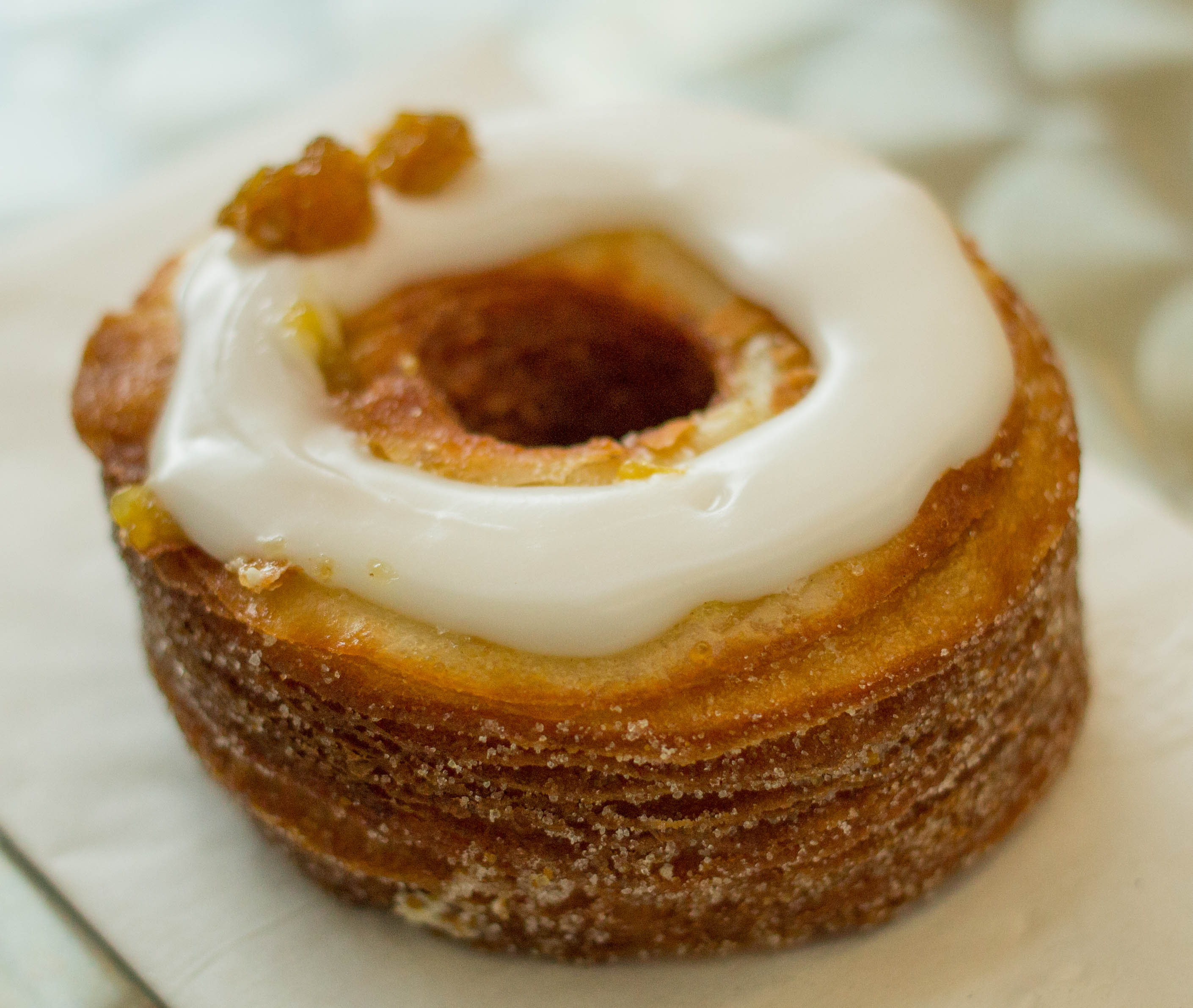 Cronut.